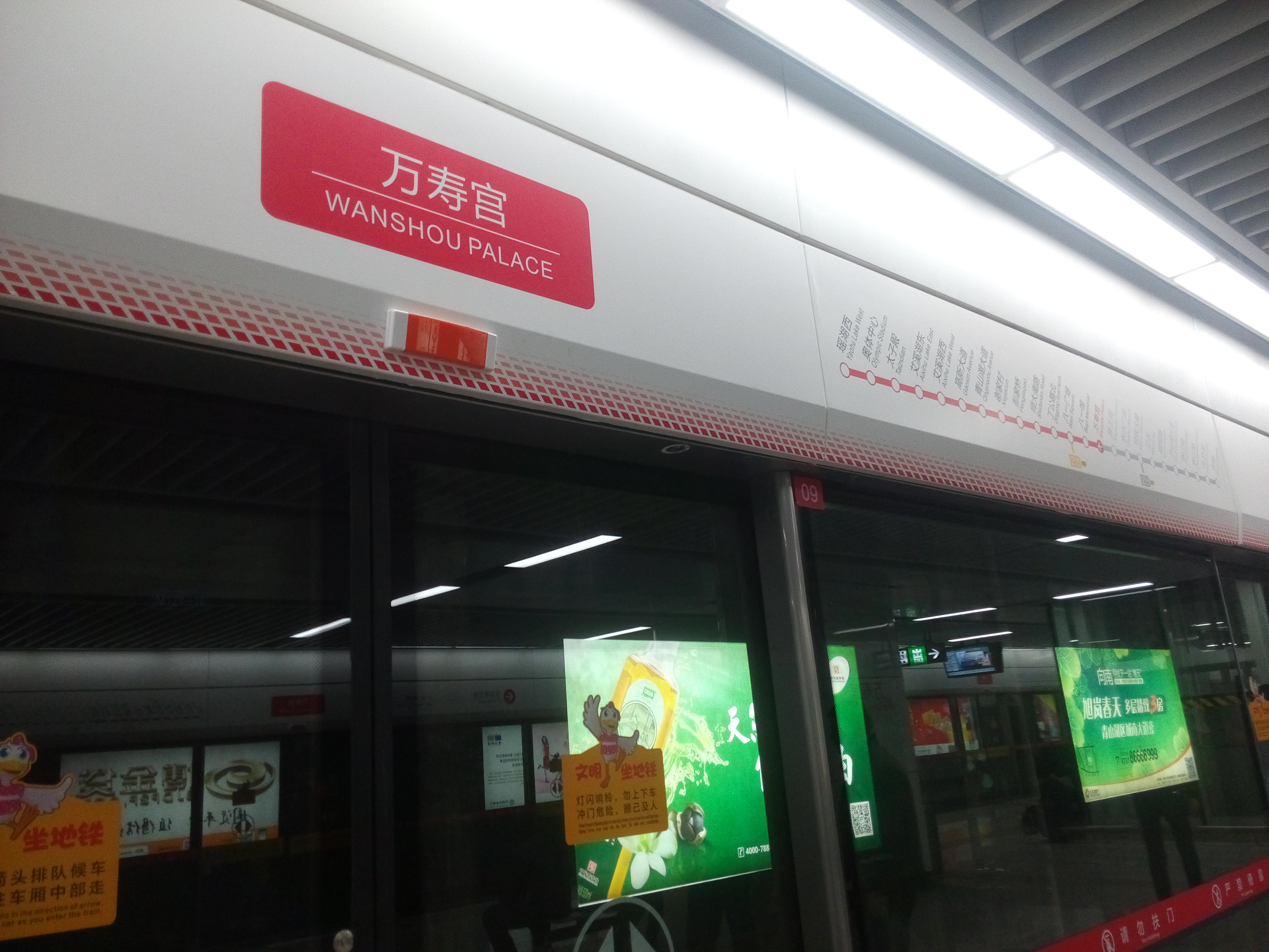 万寿宫站瑶湖西方向站台